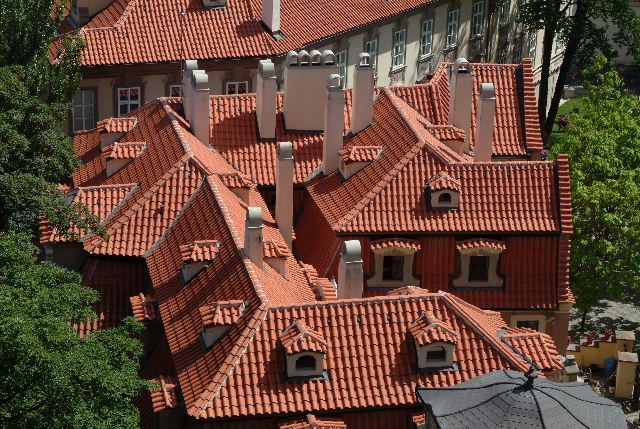 Střechy, Archív Kanceláře Senátu